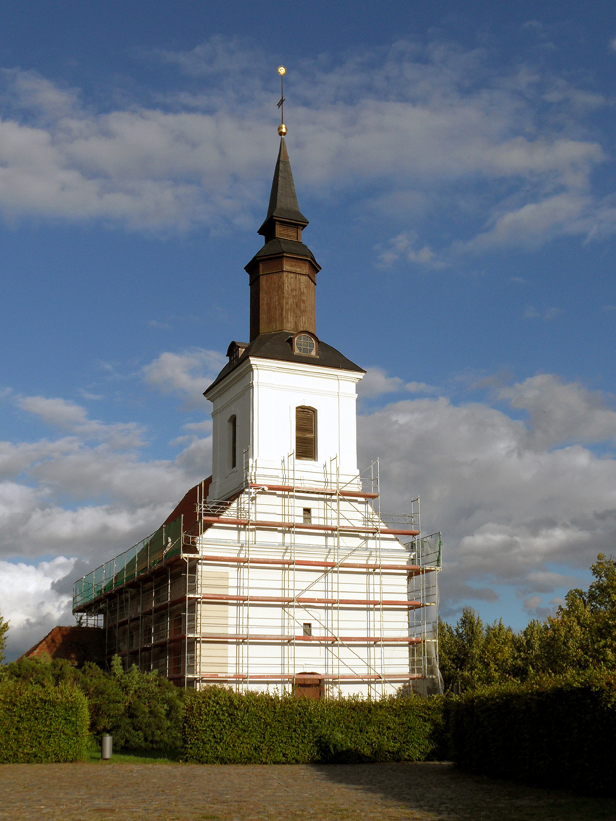 1638 wird eine von Georg und Dorothea von Eickstedt gestiftete Kirche in Rothenklempenow geweiht. Sie wird in ihrem heutigen Erscheinungsbild 1738 mit geschlossener, oktogonaler Laterne auf der Turmspitze erneuert. Über dem Südportal der Kirche hängt ein dekoratives Wappen der Familie von Eickstedt. Im Inneren hat sich die originale barocke Ausstattung noch weitgehend erhalten.